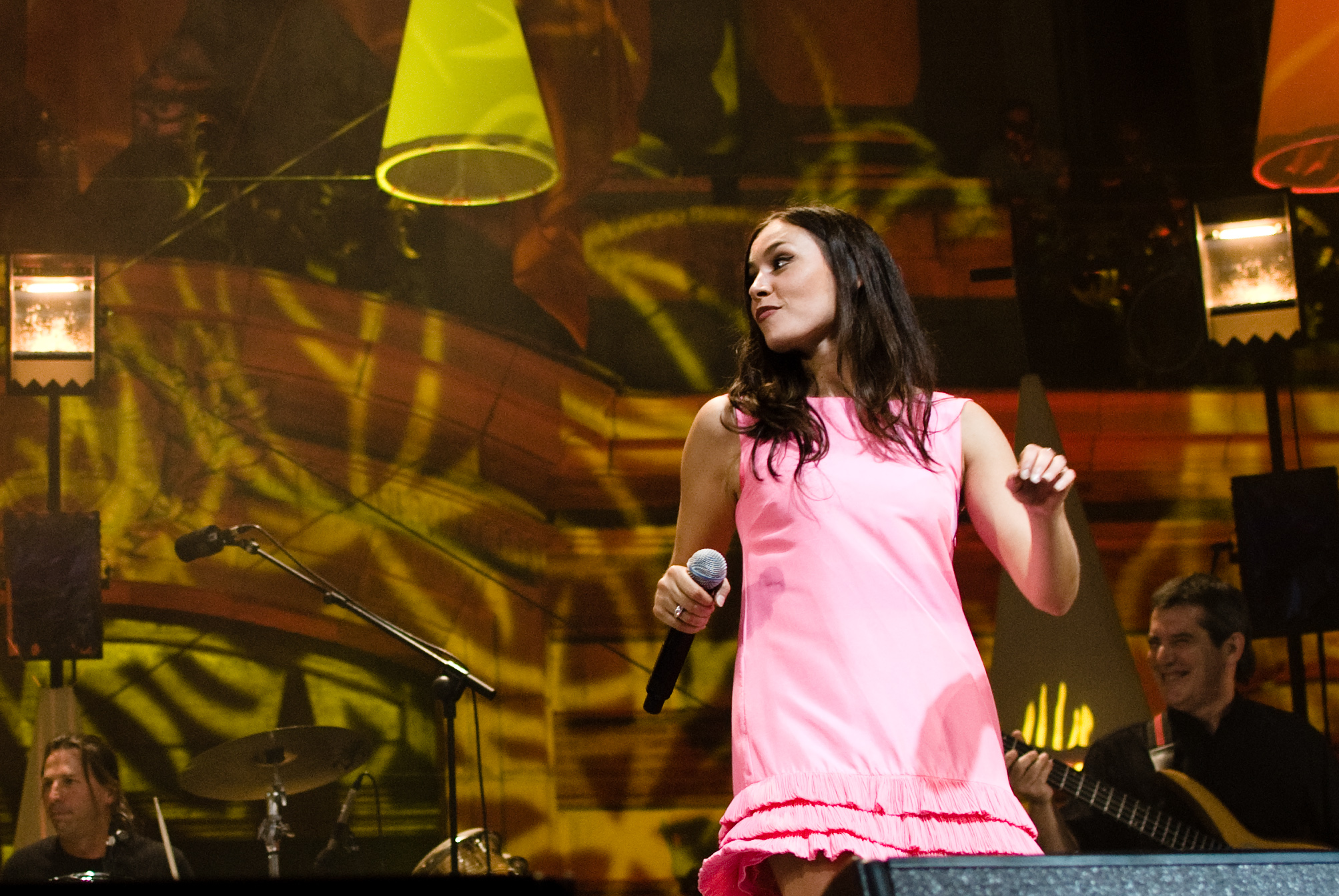 Olivia Ruiz, à l'occasion du spectacle "Planète Nougaro", sur la place du Capitole le mercredi 9 septembre 2009.